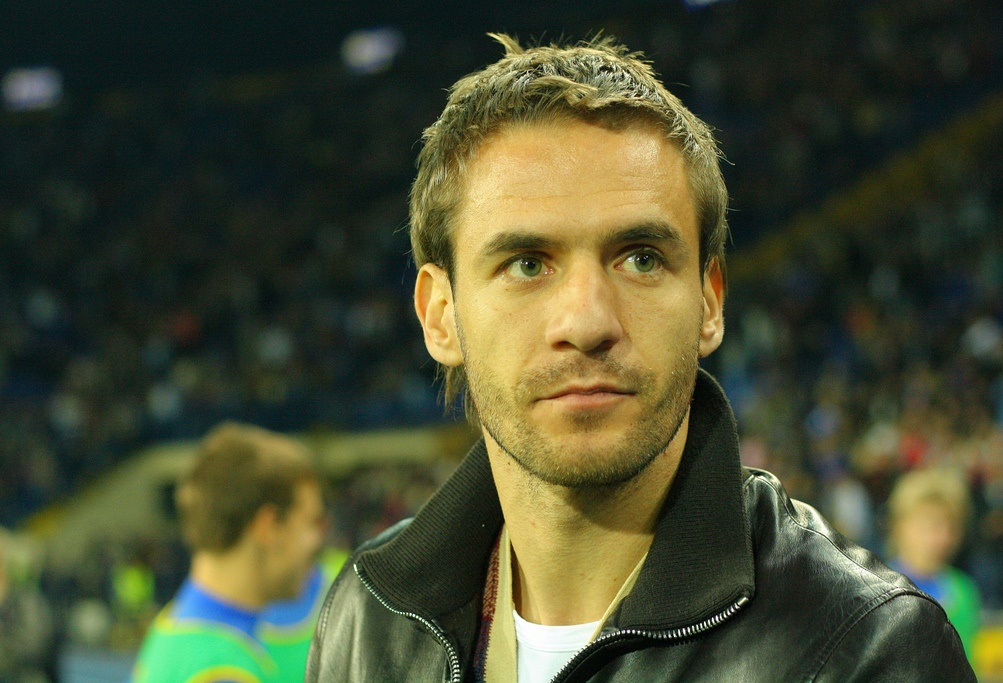 25/09/2010, Металлист - Шахтер - 1:2 Марко Девич